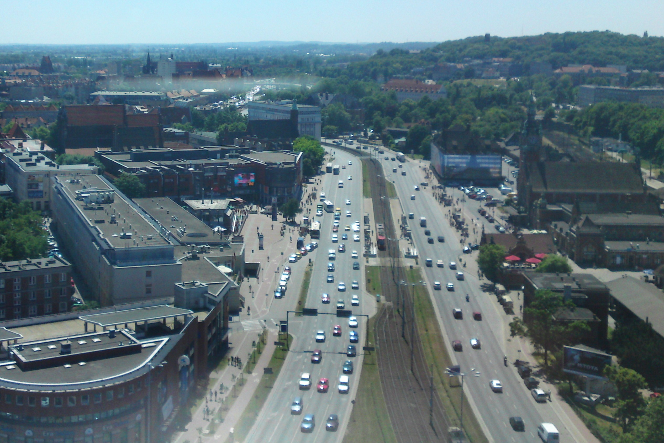 Ulica Podwale Grodzkie w Gdańsku. Camera: Sony Ericsson C905 License on Flickr (2011-01-24): CC-BY-2.0 Flickr tags: Danzig, gdansk, polen, poland